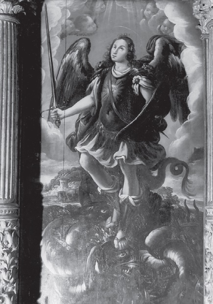 San Miguel arcángel, retablo mayor de la iglesia parroquial de Santa Eulalia de Esparreguera. Destruido (incendiado en 1936)